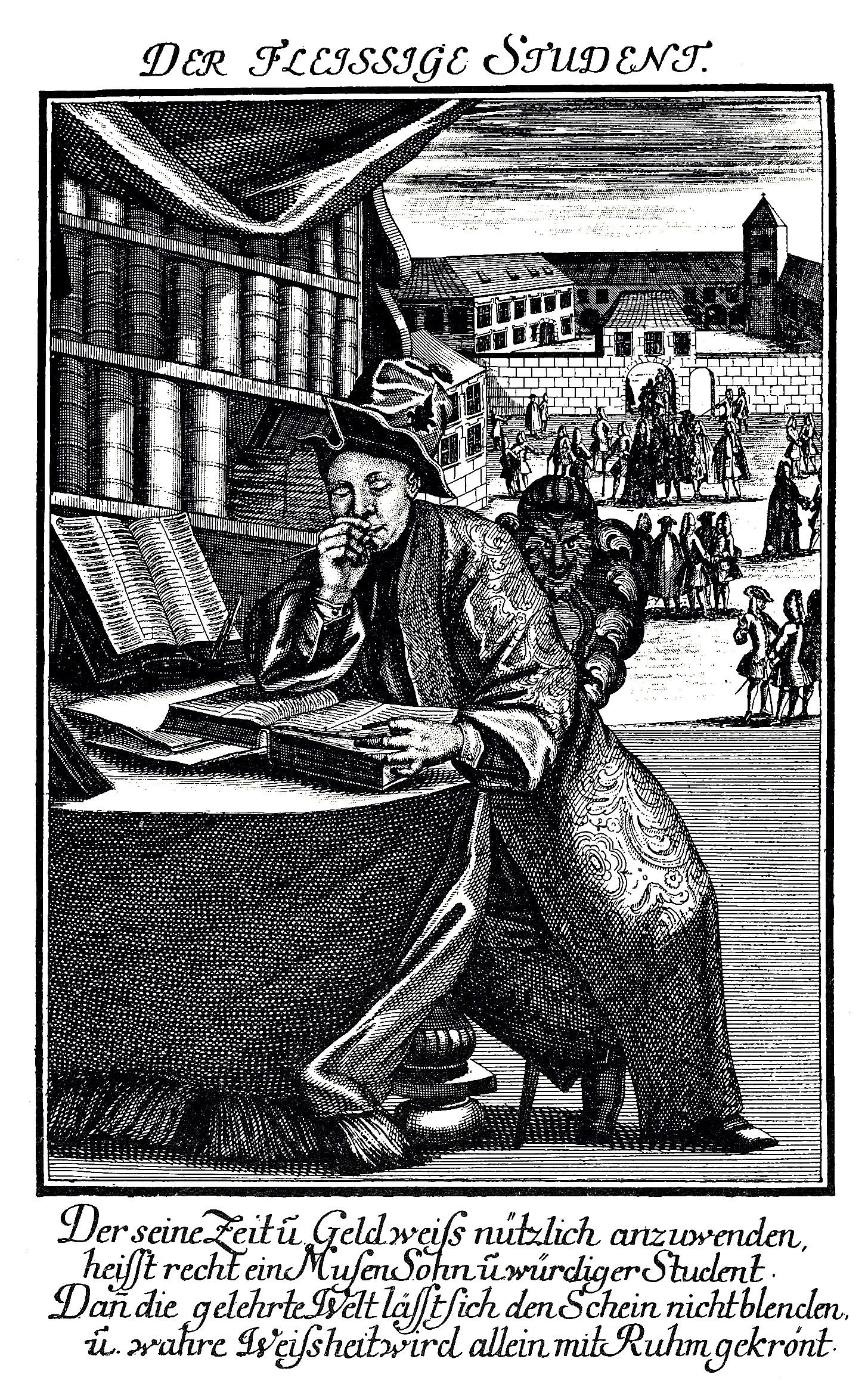 Johann Georg Puschner, "Der Fleissige Student", Kupferstich um 1725, aus einer Reihe von Kupferstichen über das Studentenleben an der Universität Altdorf, der alten Universität der Freien Reichsstadt Nürnberg, im Hintergrund ist das Gebäude der Universität mit dem typischen Torhaus zu sehen.